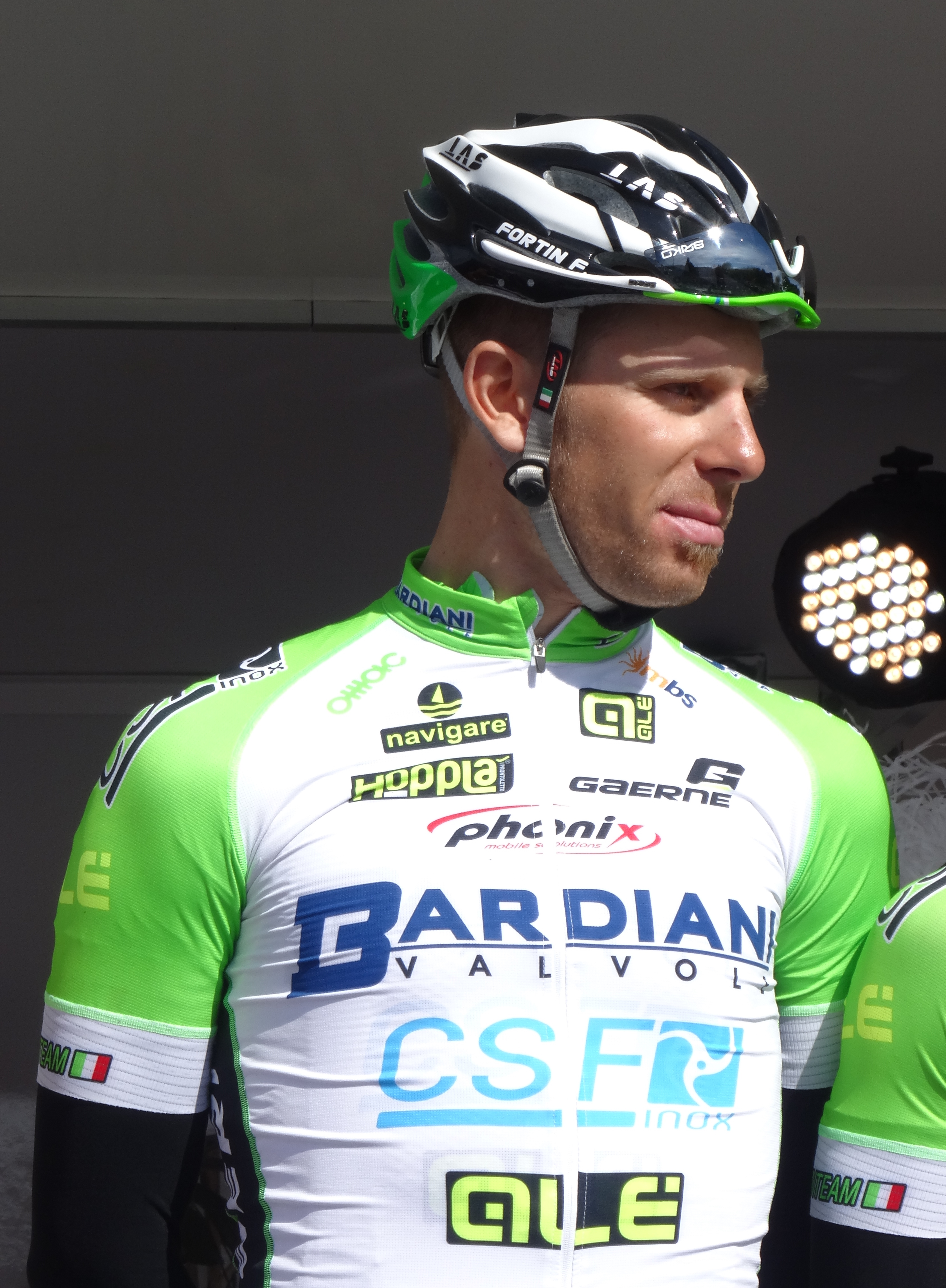 Reportage réalisé le jeudi 17 avril à l'occasion du départ et de l'arrivée du Grand Prix de Denain 2014 à Denain, Nord, Nord-Pas-de-Calais, France.